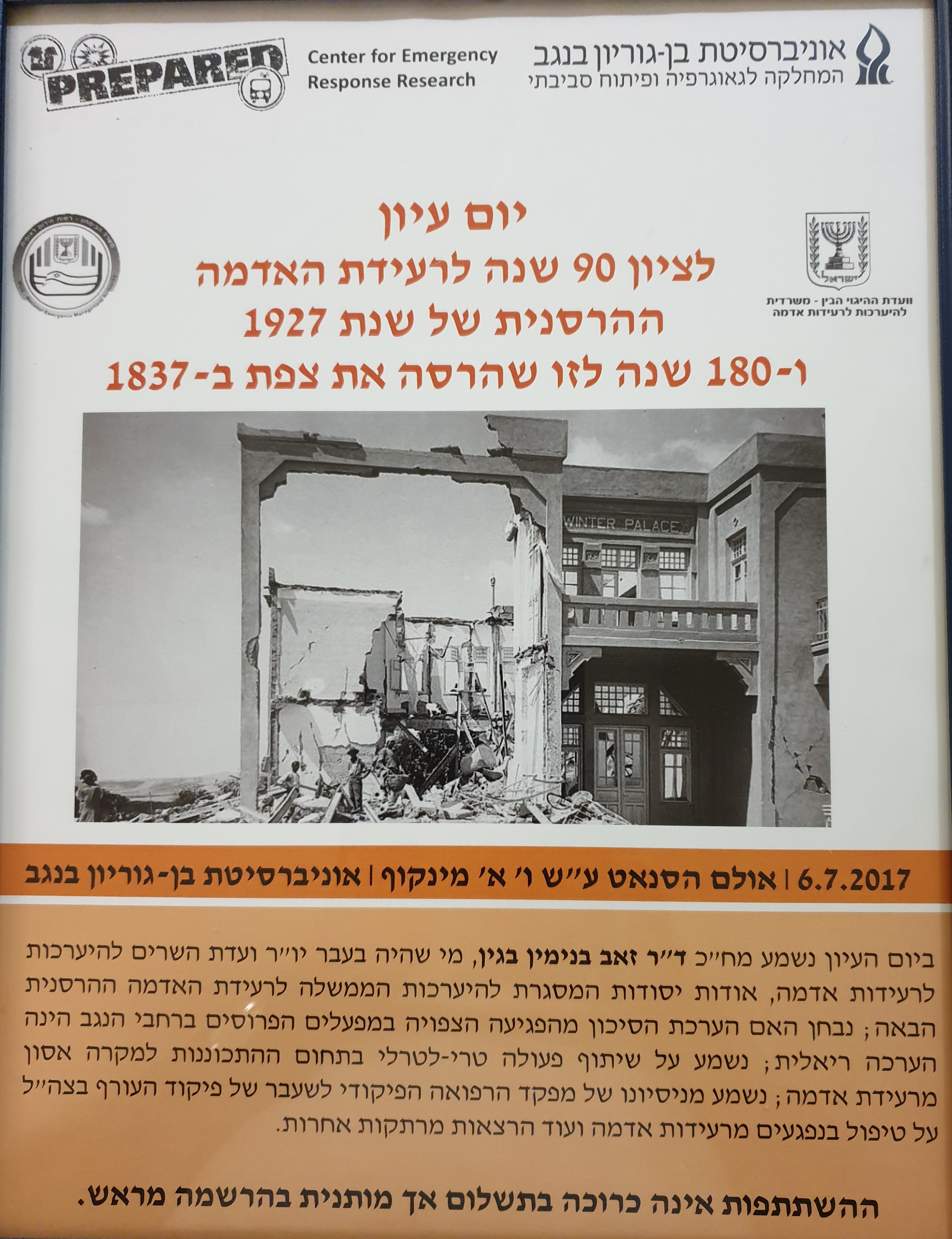 לציון רעידות האדמה הללו, ולדיונים אודות ההתכוננות והמוכנות לרעידת האדמה ההרסנית הבאה, התקיים באונ' ב.ג. בנגב כנס שעסק בנושא. עיצוב: גב' רוני ליבנון, המח' לגאוגרפיה ופיתוח סביבתי באוניברסיטה.